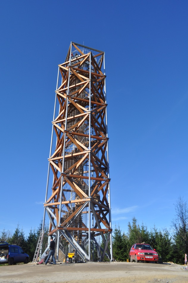 Rozhledna na Pekelném kopci u Třebíče (572 m n. m.) - ukončovací práce